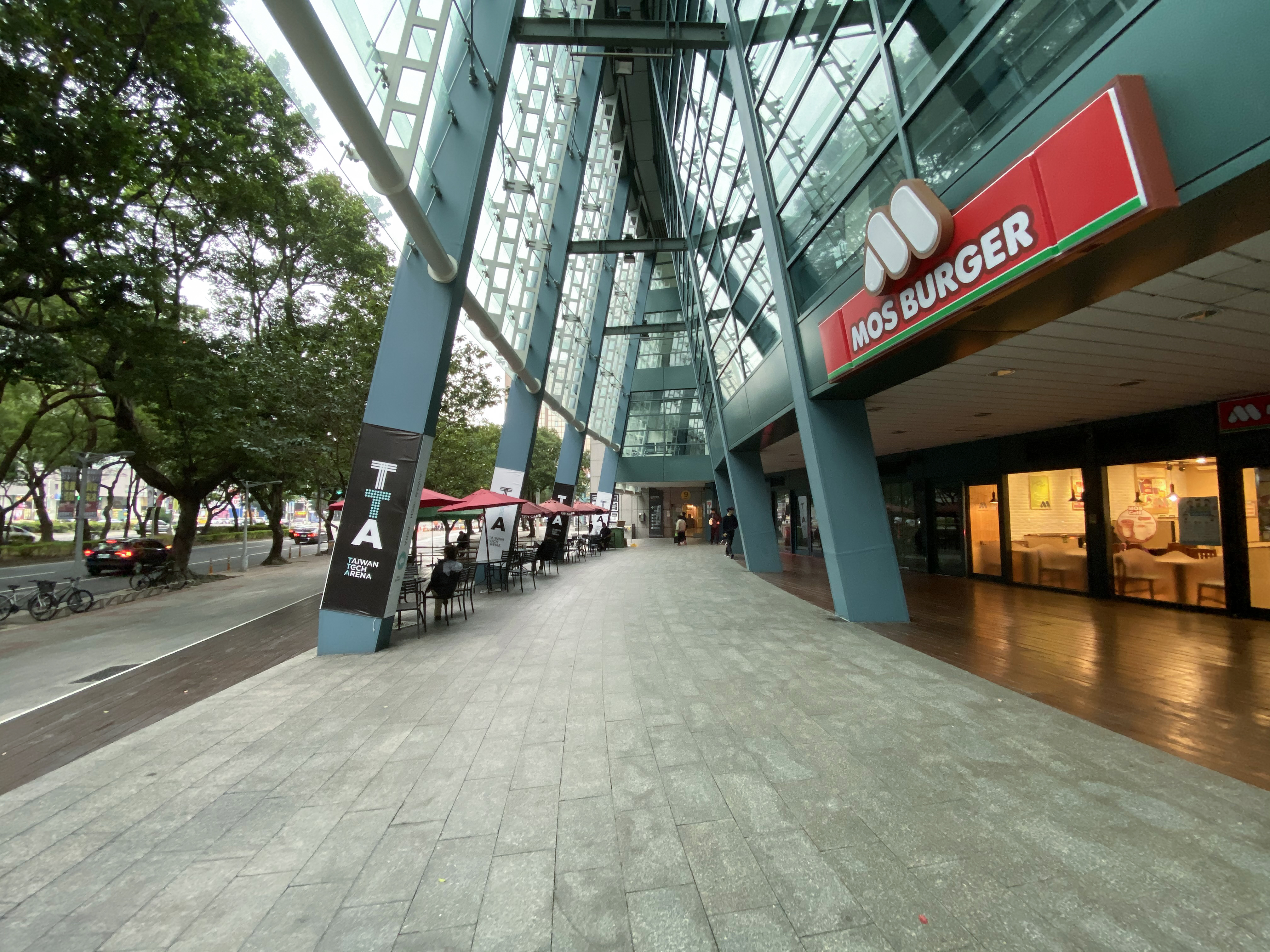 中文（台灣）: 臺北小巨蛋外，摩斯漢堡前通道。